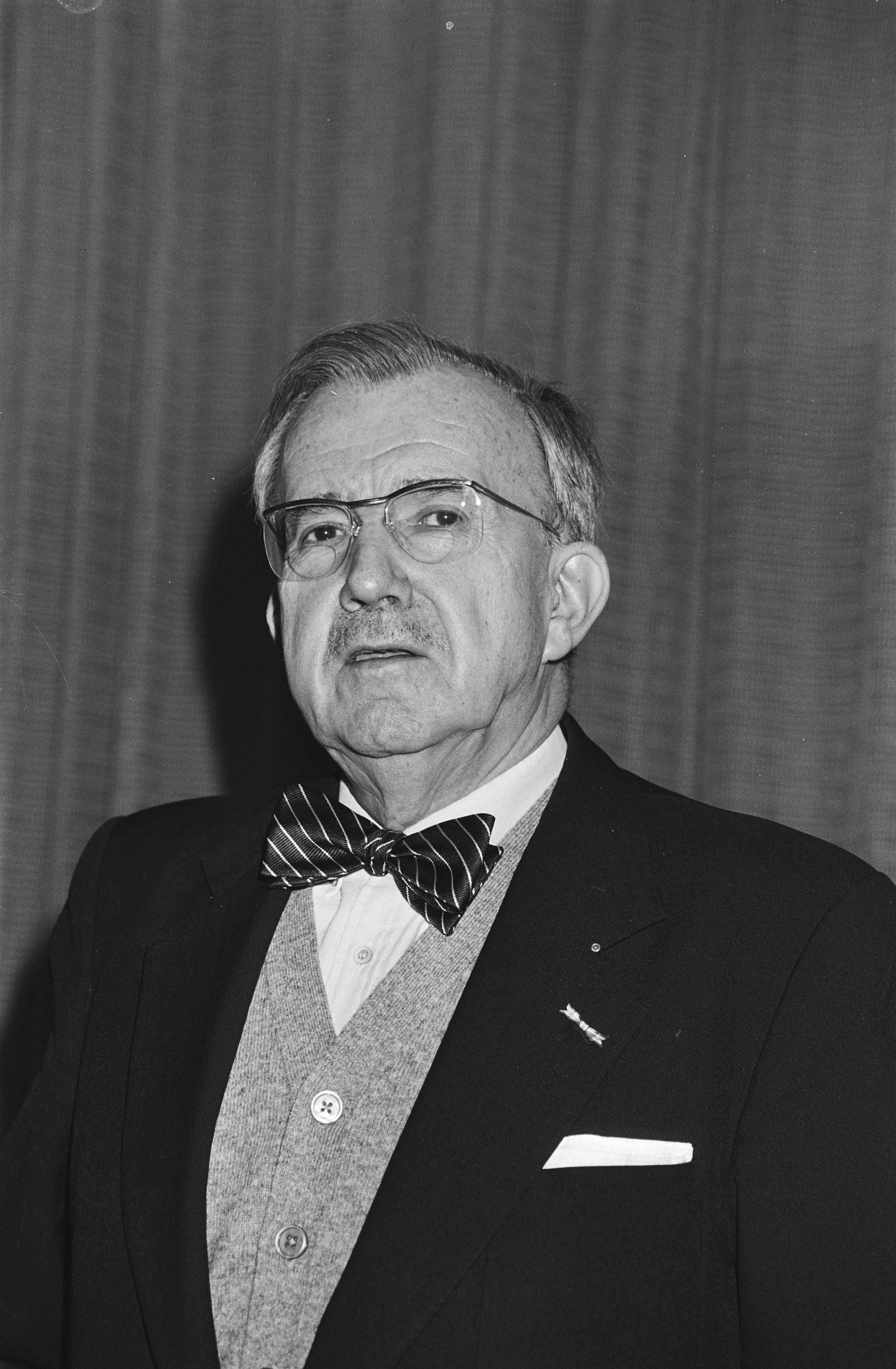 Collectie / Archief : Fotocollectie Anefo Reportage / Serie : [ onbekend ] Beschrijving : Persconferentie in Amsterdam van CPNB i.v.m boekenweek die van 26-03 t/m 04-04 wordt gehouden, schrijver Henri Knap (kop) Datum : 2 maart 1981 Locatie : Amsterdam, Noord-Holland Trefwoorden : BOEKENWEKEN, persconferenties, schrijvers Persoonsnaam : CPNB, Henri Knap Fotograaf : Dijk, Hans van / Anefo Auteursrechthebbende : Nationaal Archief Materiaalsoort : Negatief (zwart/wit) Nummer archiefinventaris : bekijk toegang 2.24.01.05 Bestanddeelnummer : 931-3517